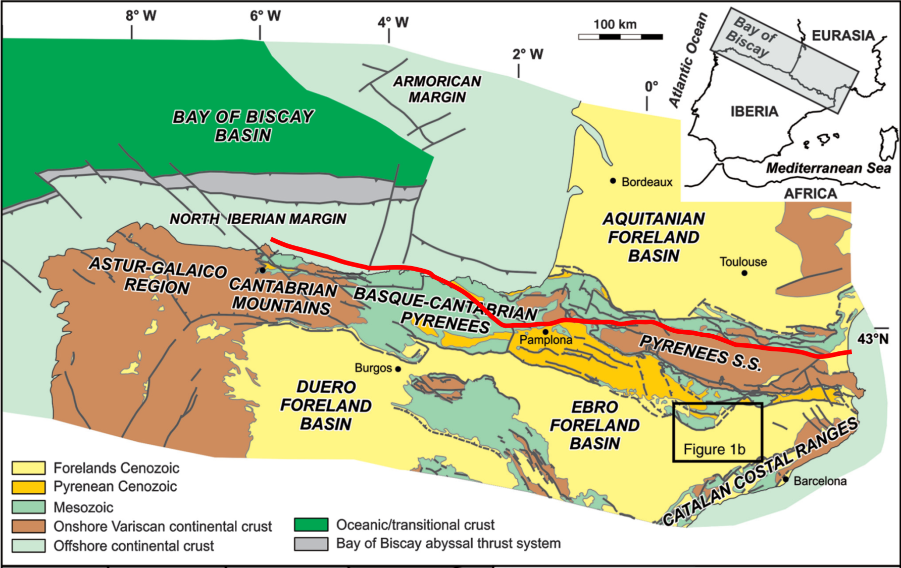 Age des roches de la chaine Pyreneo-cantabrique Tracé approximatif en rouge de la faille nord-pyrénéenne